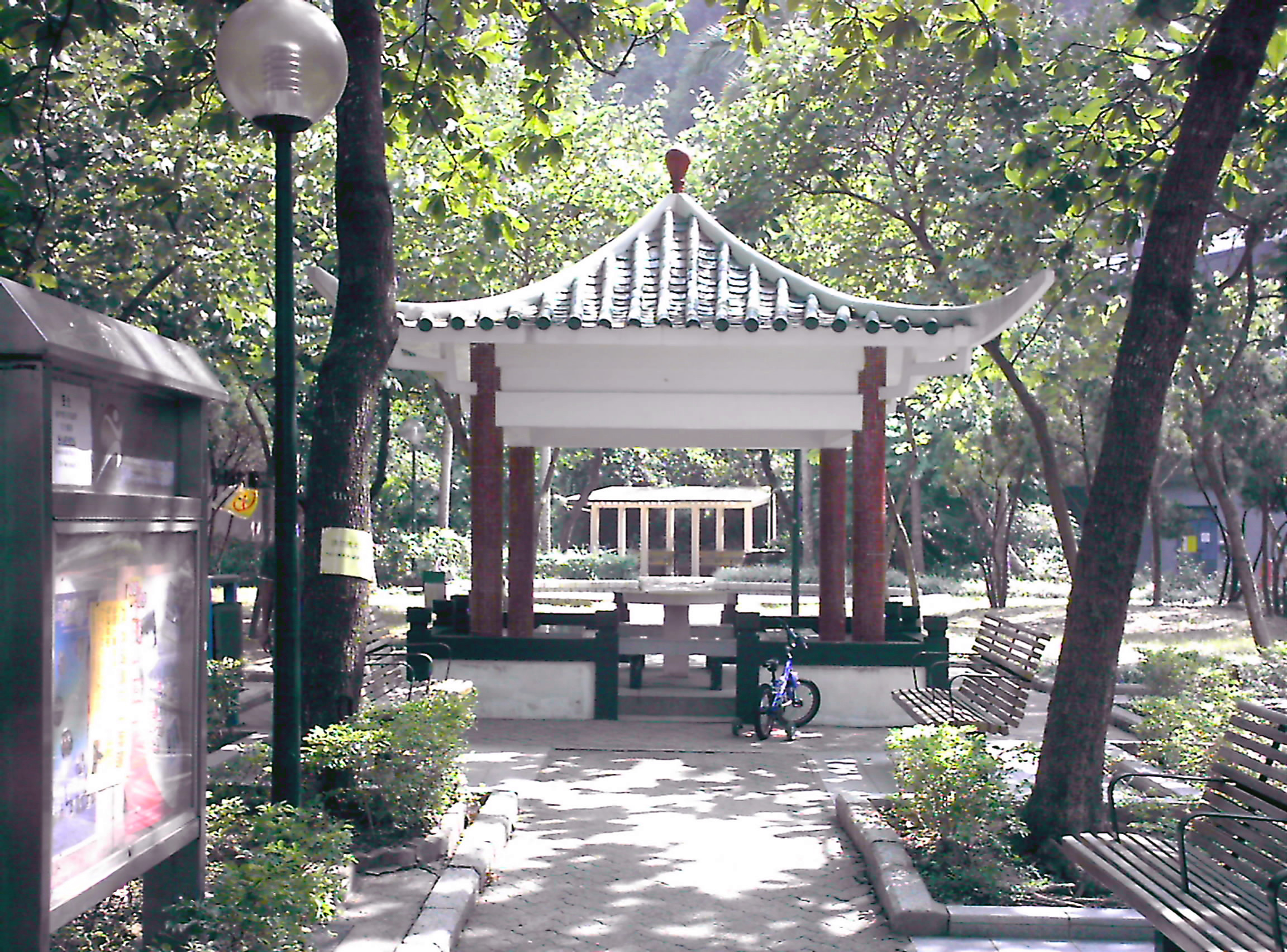 中文（香港）: 1965年的春季建築的四角涼亭，位於三馬路蘭谷(Orcid Valley，又被稱為「寶雲道花園」)。